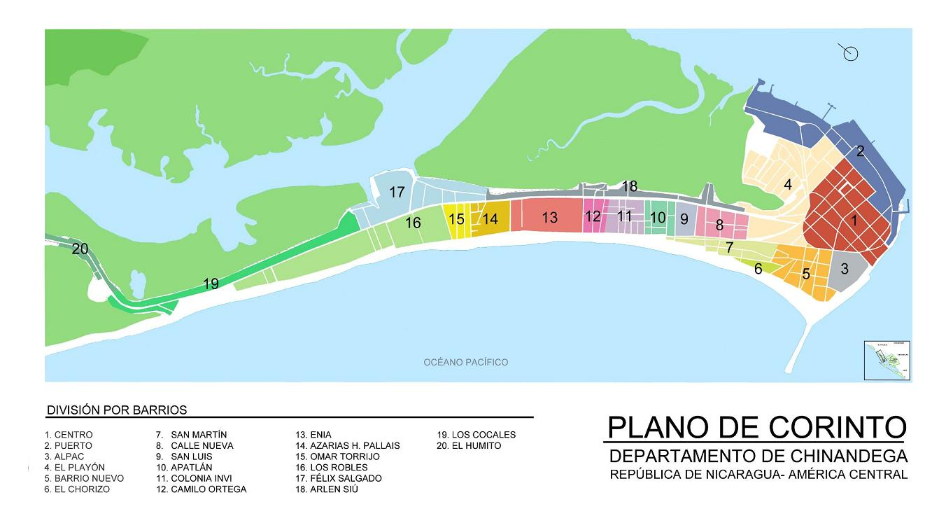 plano del puerto de corinto, nicaragua.